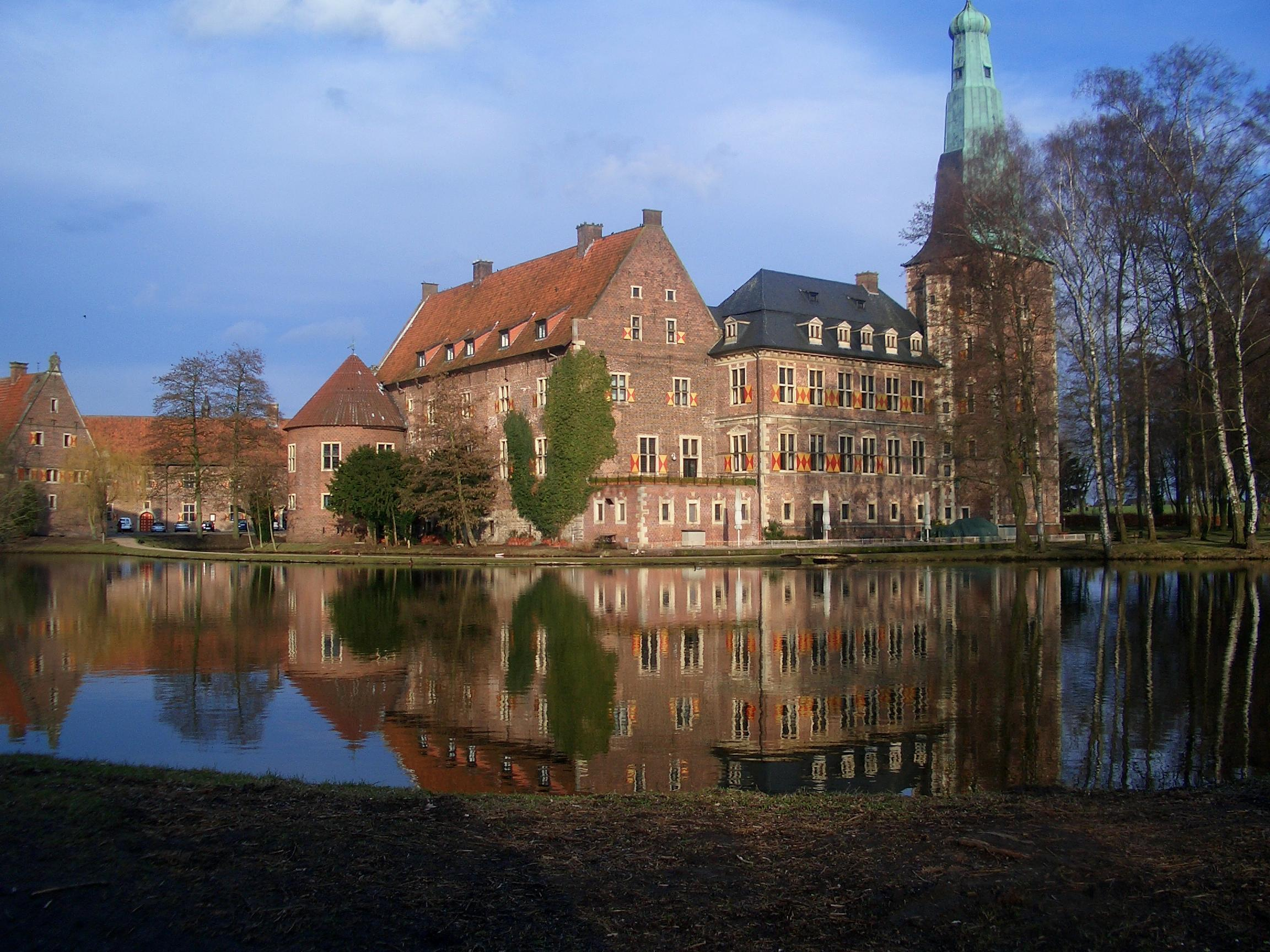 Wasserschloß Raesfeld NRW Selber fototgrafiert Reinhrad Lucas